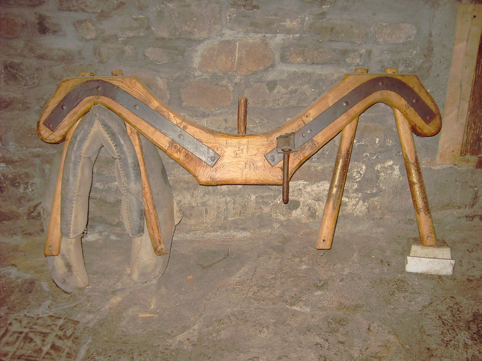 Yugo o Chubo para uso con mulas con una collera puesta a modo de ejemplo.